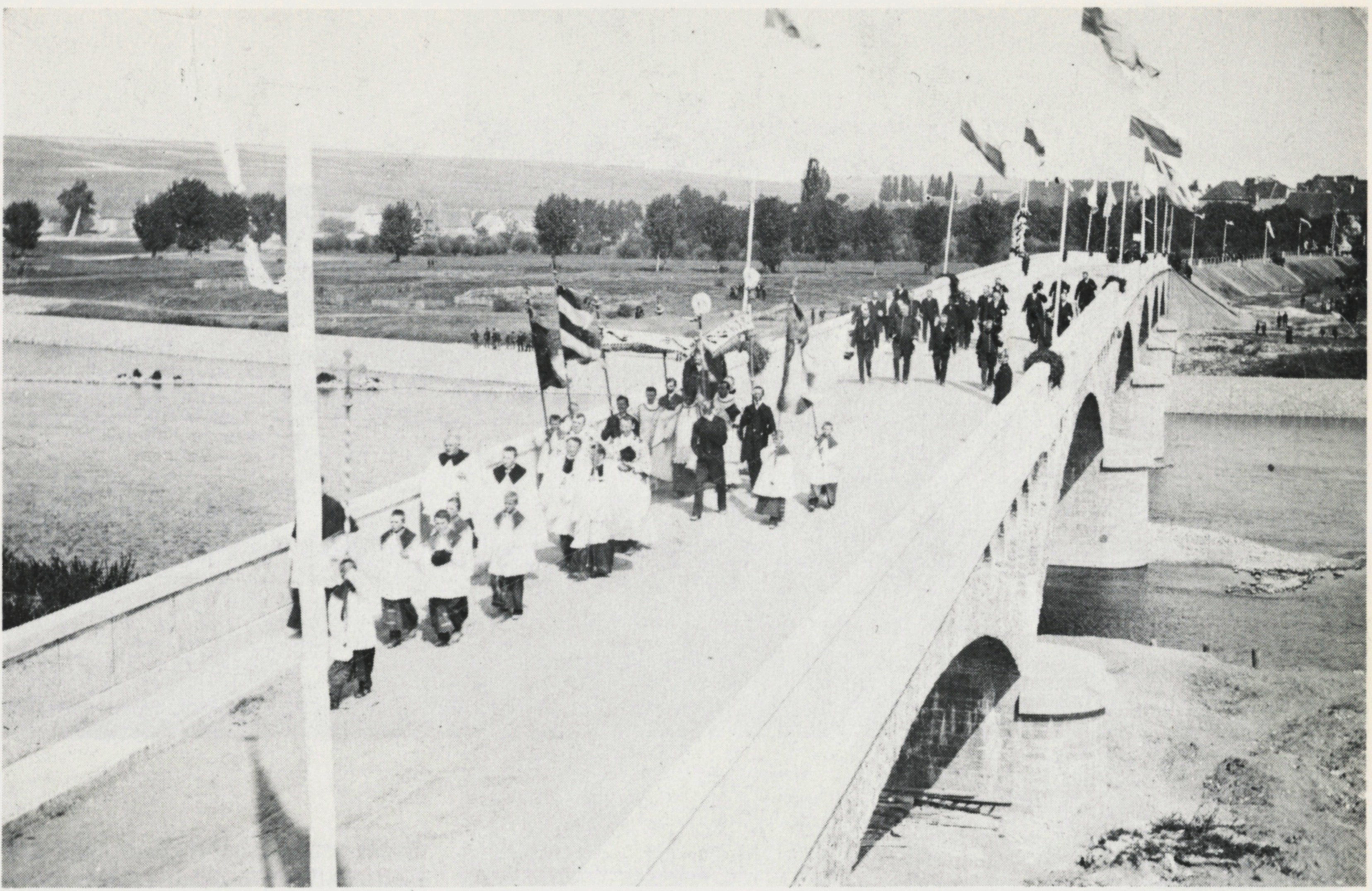 Fotografie der Einweihung der Volkacher Mainbrücke am 21. August 1892, Prozession mit dem Bischof von Würzburg Franz Joseph von Stein.